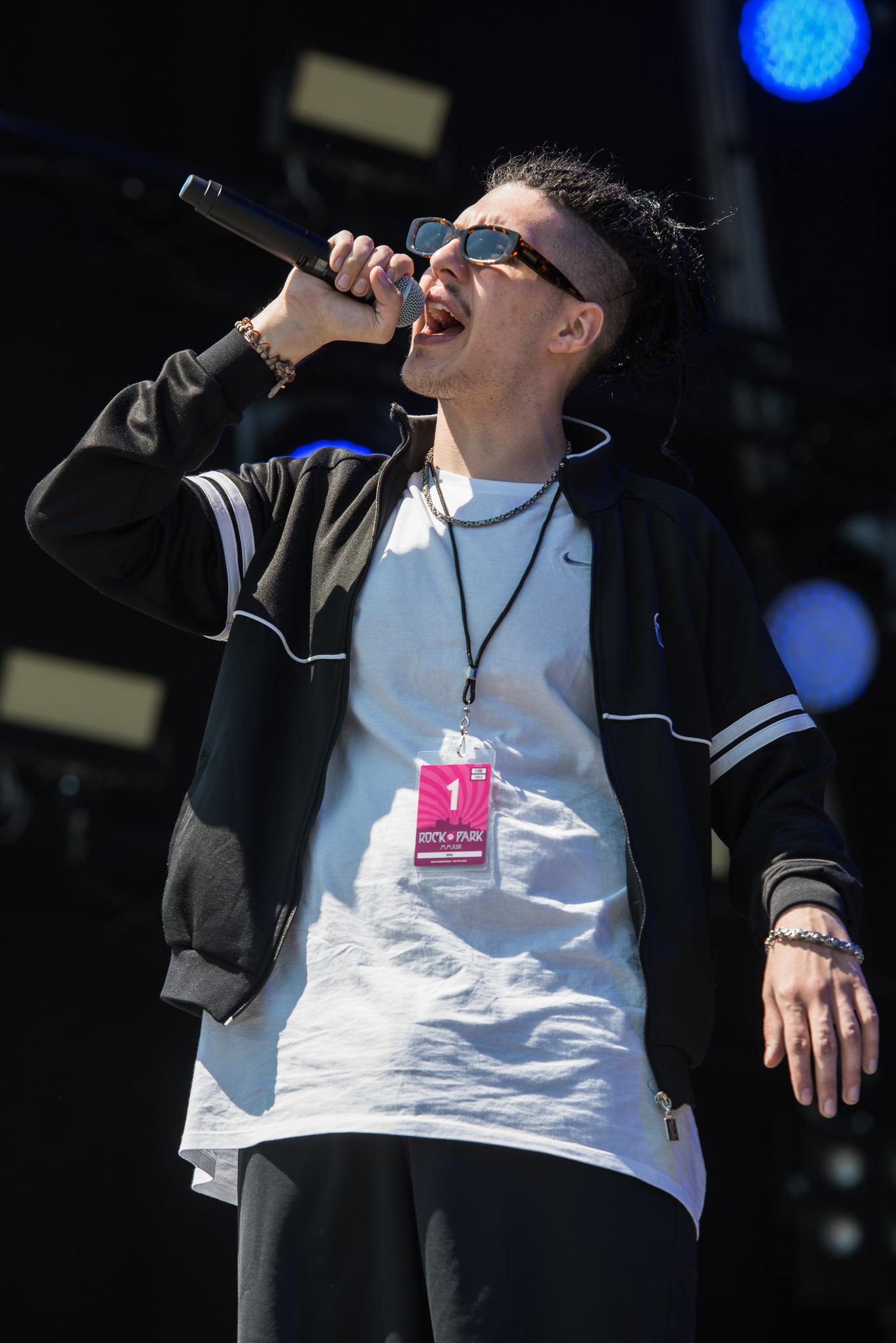 ARGO-Konzerte,Beck's Park Stage,Konzert,Livekonzert,Livemusik,Musik,RIN,RiP,Rock im Park 2017